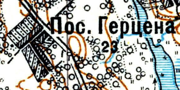 Топографическая карта Ленинградской области, квадрат Vc-29 (Батецкая), посёлок Герцена